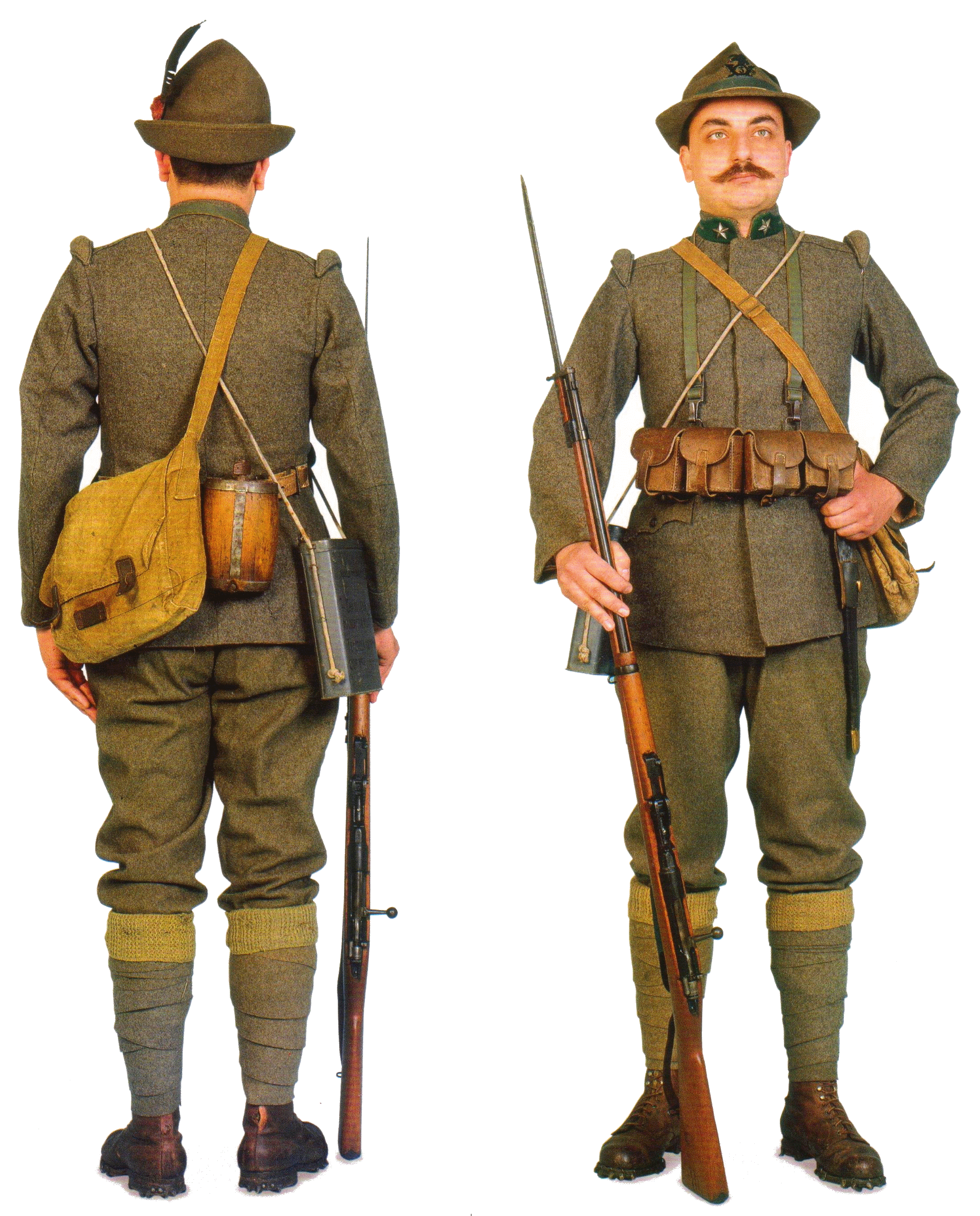 Příslušník italské legie